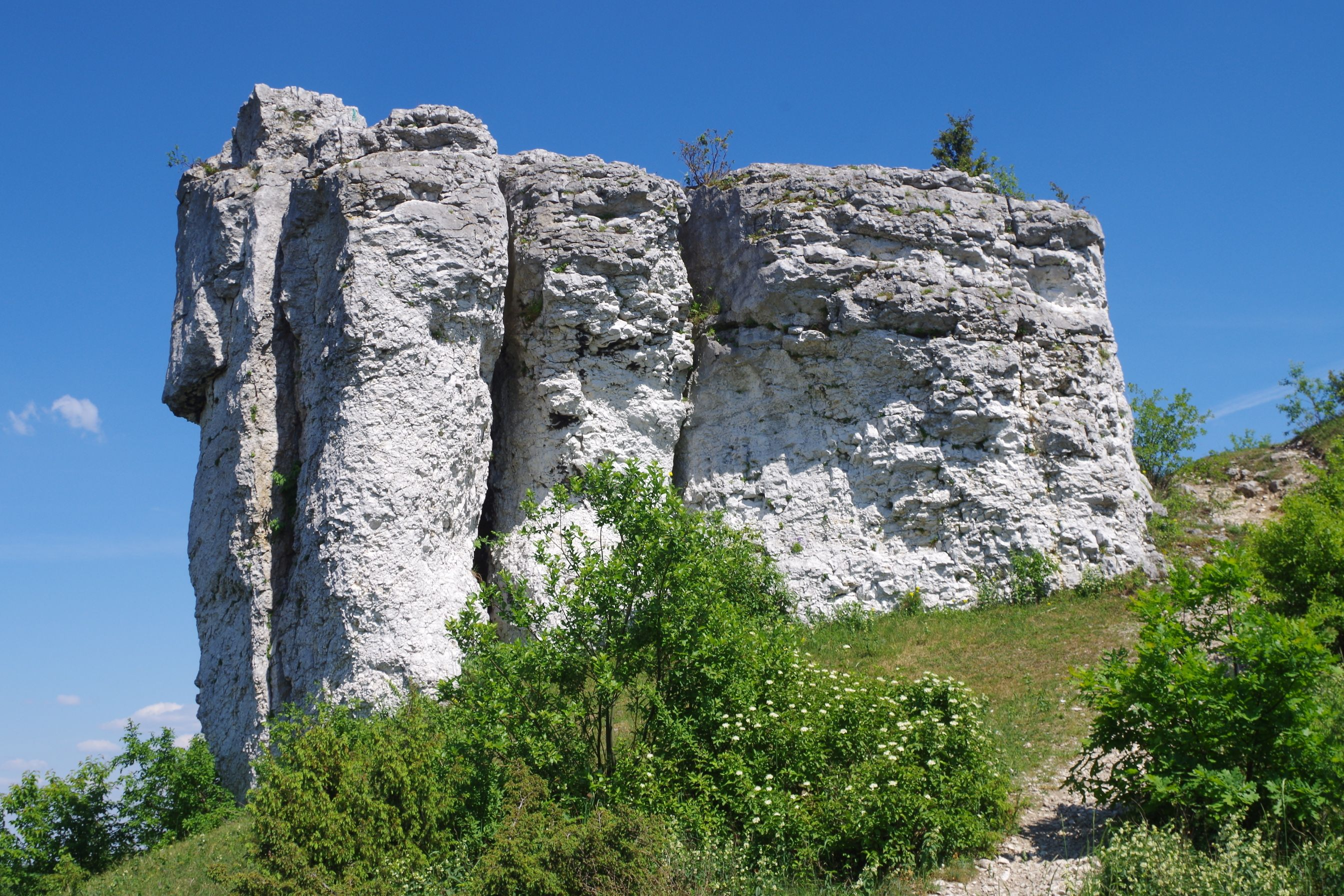 Skała Grzybki na wzgórzu Lipówki w Olsztynie